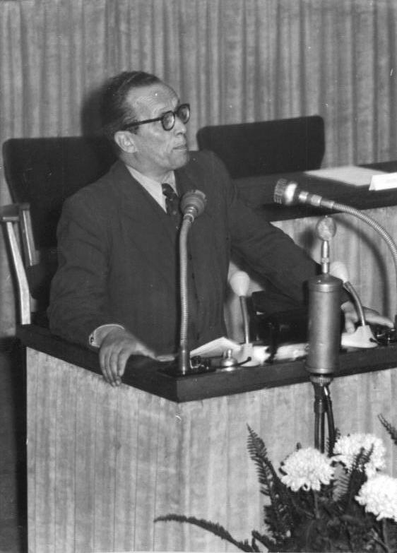 Illus-Quaschinsky 10.10.51 Ausserordentliche Volkskammersitzung. Auf einer Außerordentlichen Volkskammersitzung am 10.10.51 antwortete Ministerpräsident Groewohl auf dei Vorschläge des Bundestages. UBz: Vincenz Müller, Vizepräs.d.Volkskammer